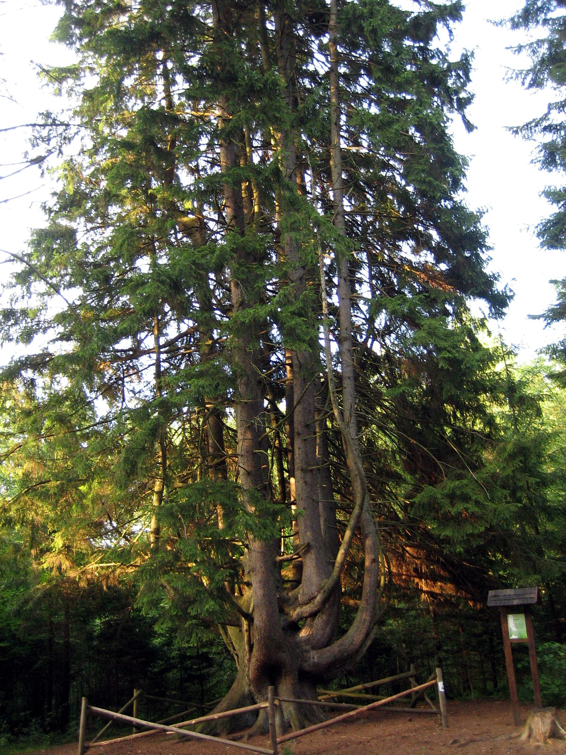 "Raganų eglė" - gamtos paminklas Vilkyškių miške Rambyno regioniniame parke